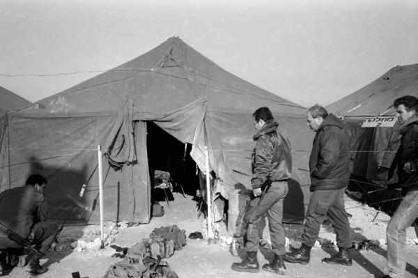 ליל הקילשונים.